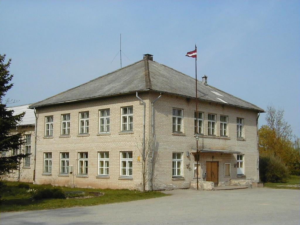 Degumnieki, Ošupes pagasta pašvaldība 2002-05-04